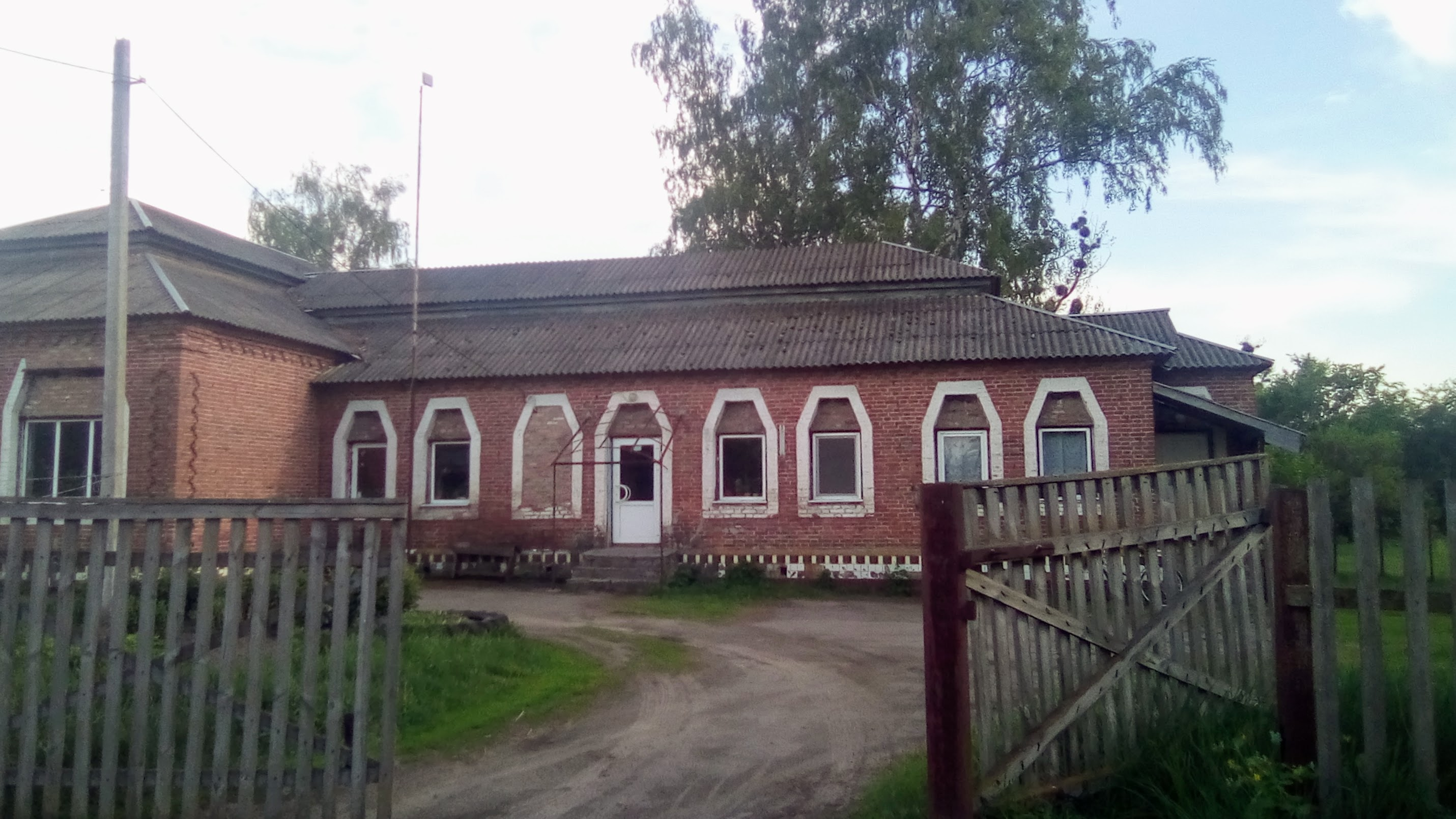 Будівля земської школи в селі Пісочки, Лохвицького району, Полтавської області. Архітектор - Сластіон.